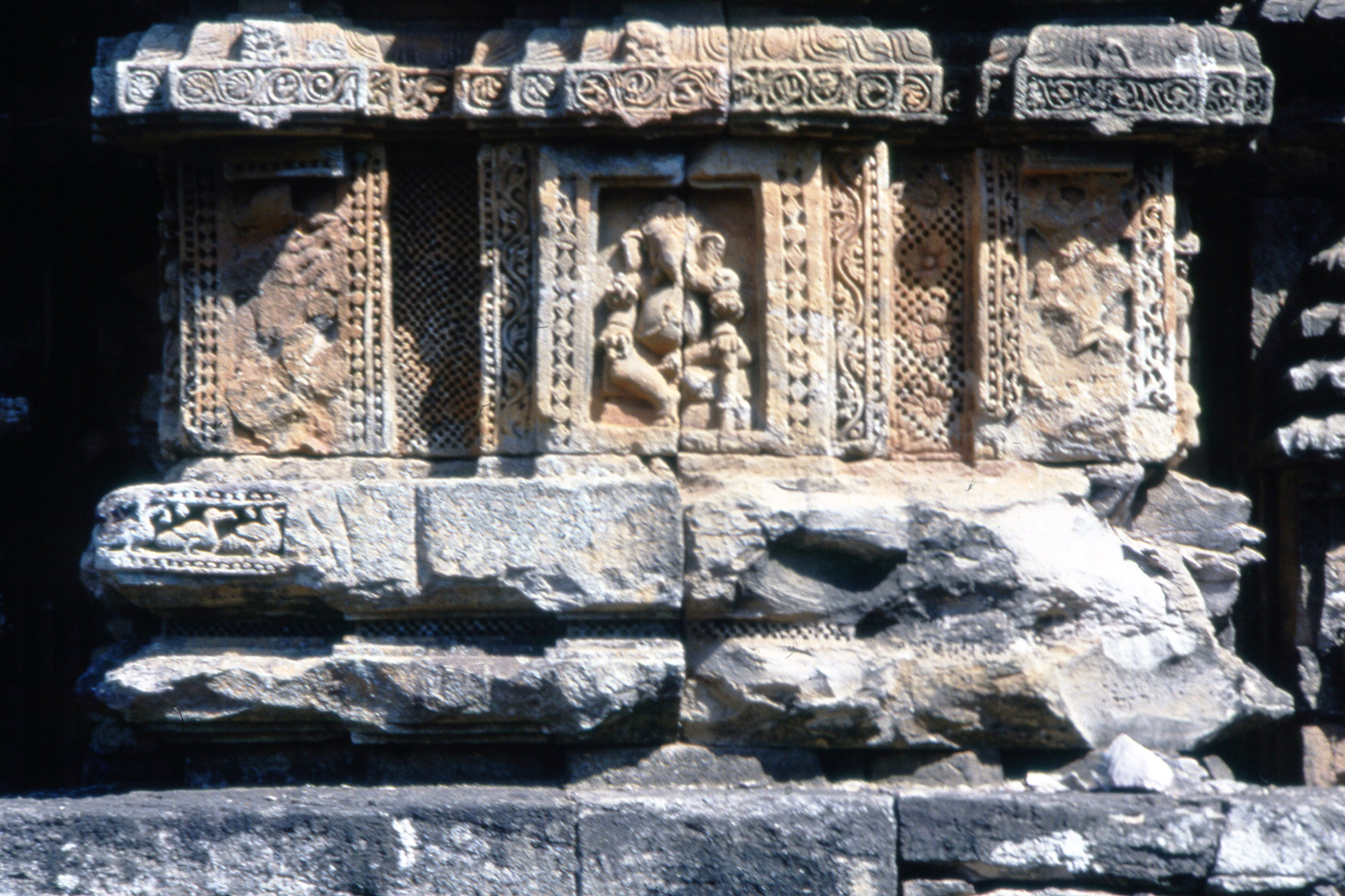 Siglo XI ,Templo Rajarani/Templo Indreswara,Hinduismo,Detalle de nicho dedicado a Ganesha. Bhuvanesvar, Orissa, India.